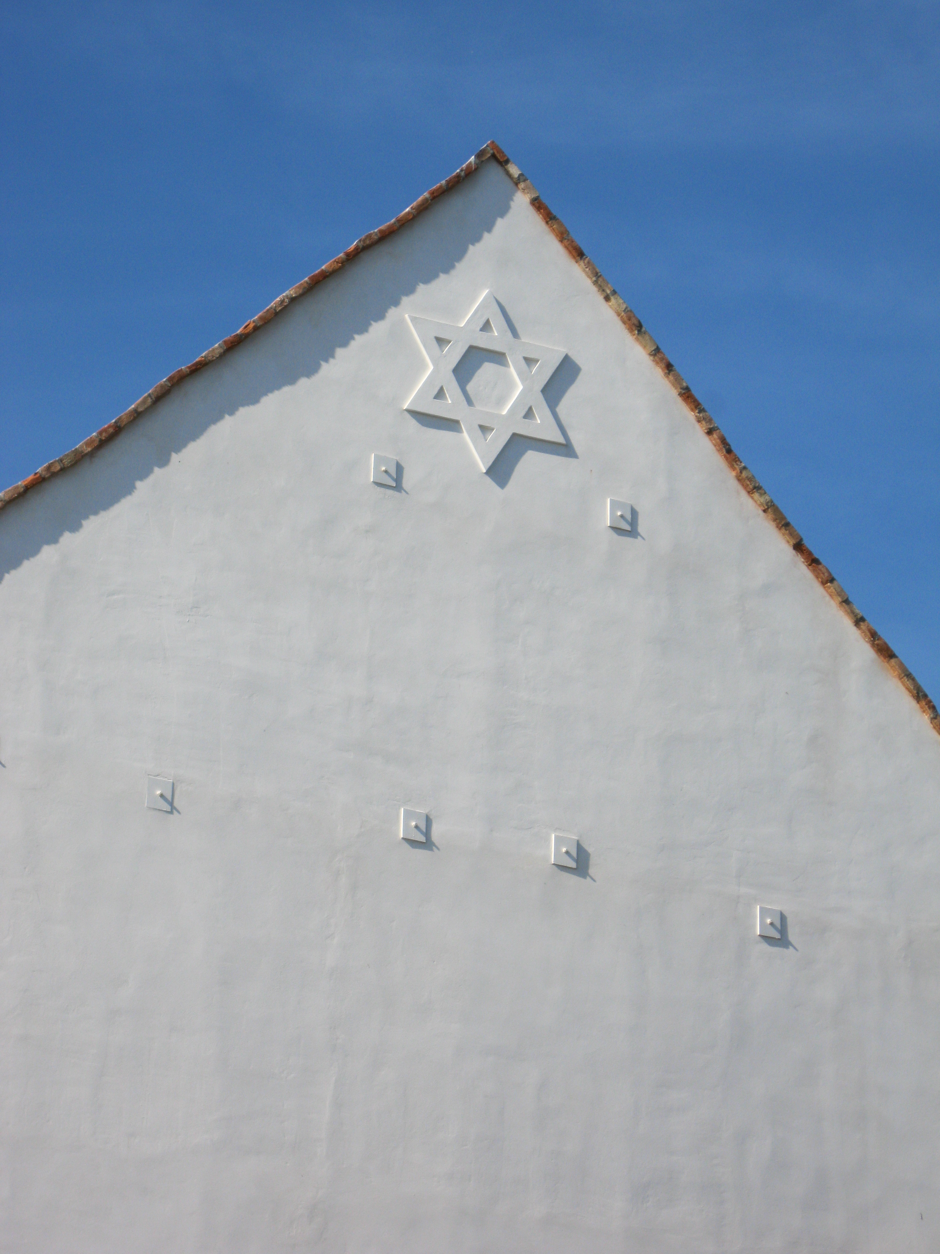 Synagoga (Loštice)